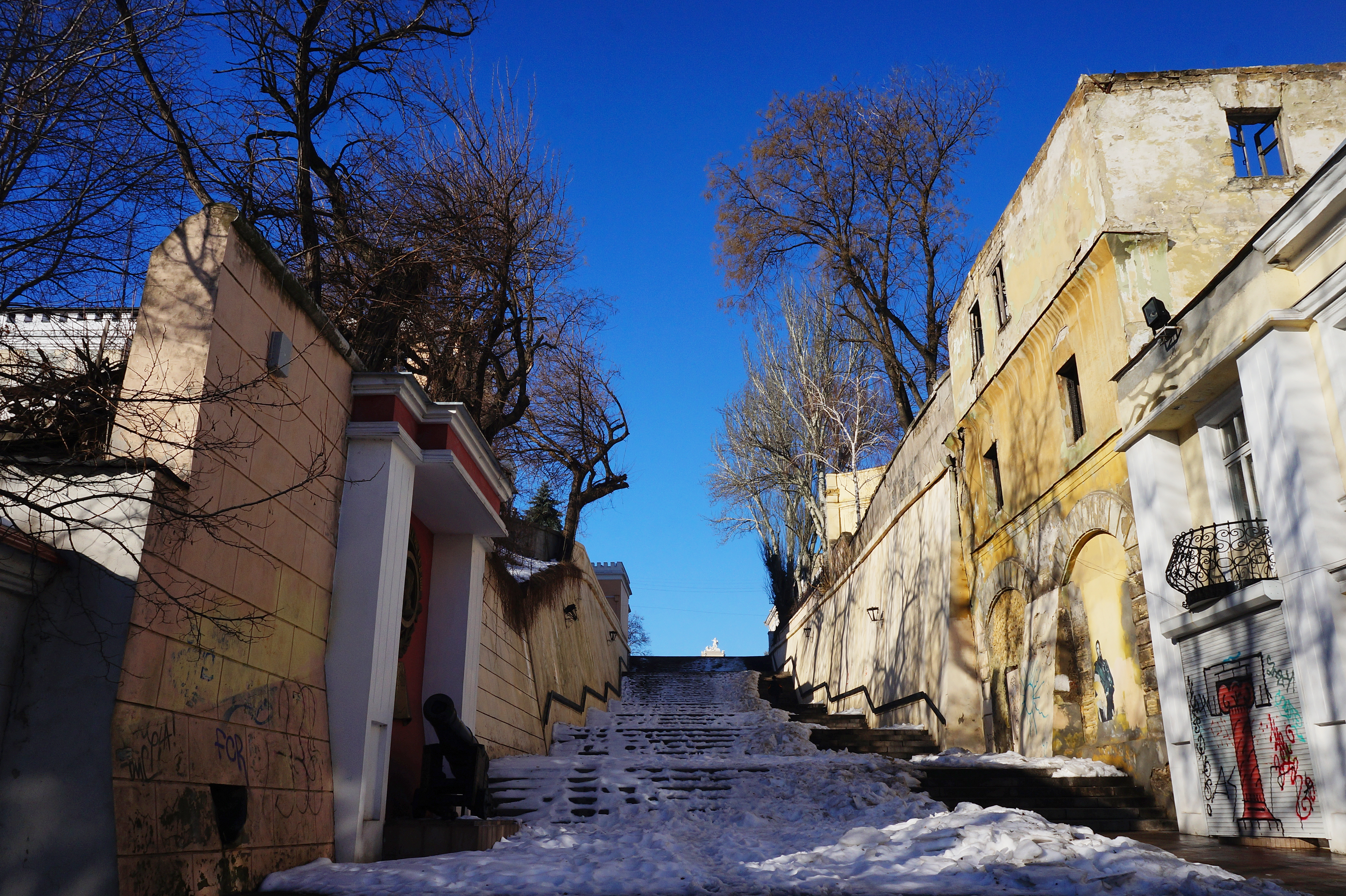 Сходи та підпірні стіни, Одеса, Ланжеронівський узв.